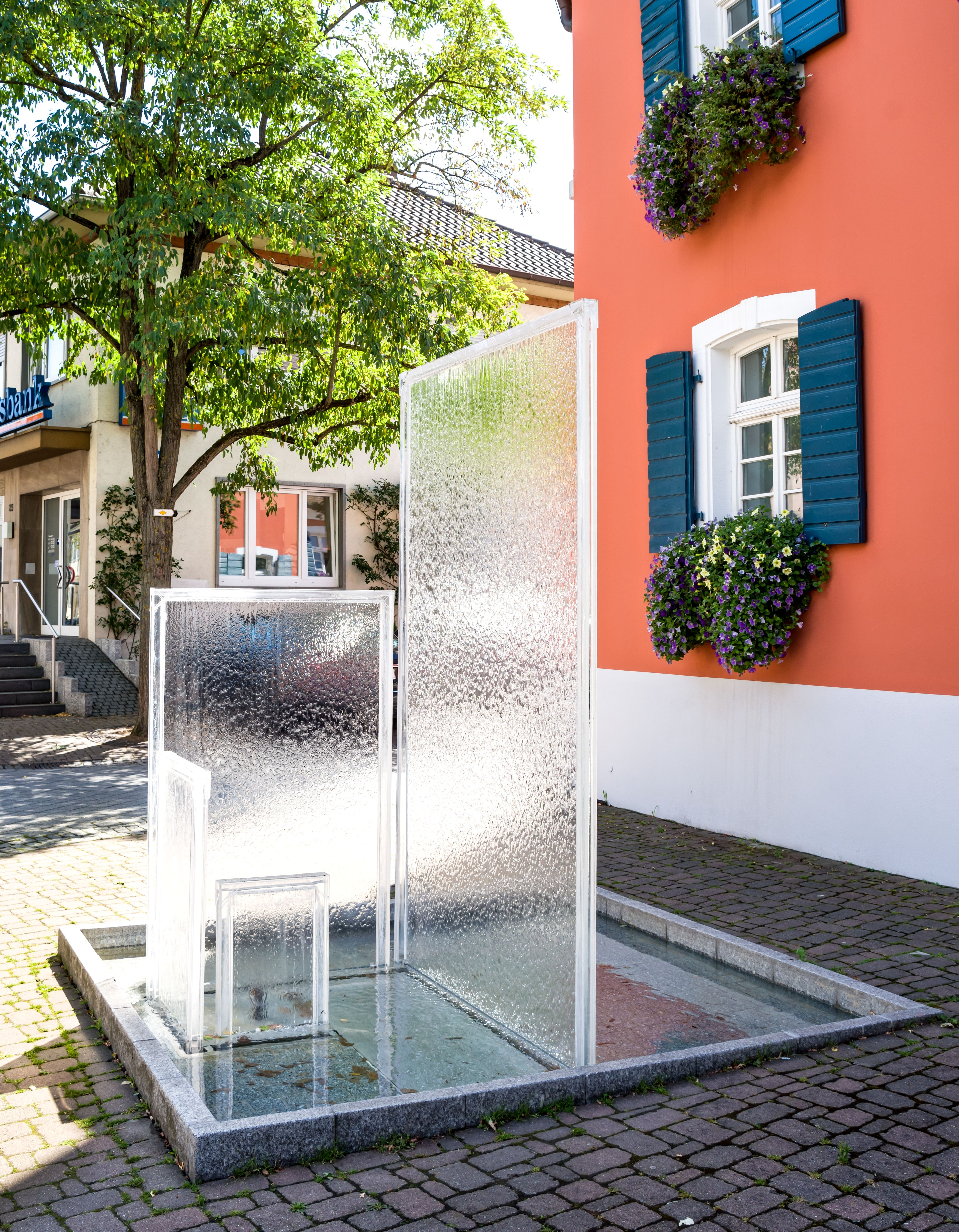 Bilder aus Gottenheim Der Brunnen vor dem Rathaus